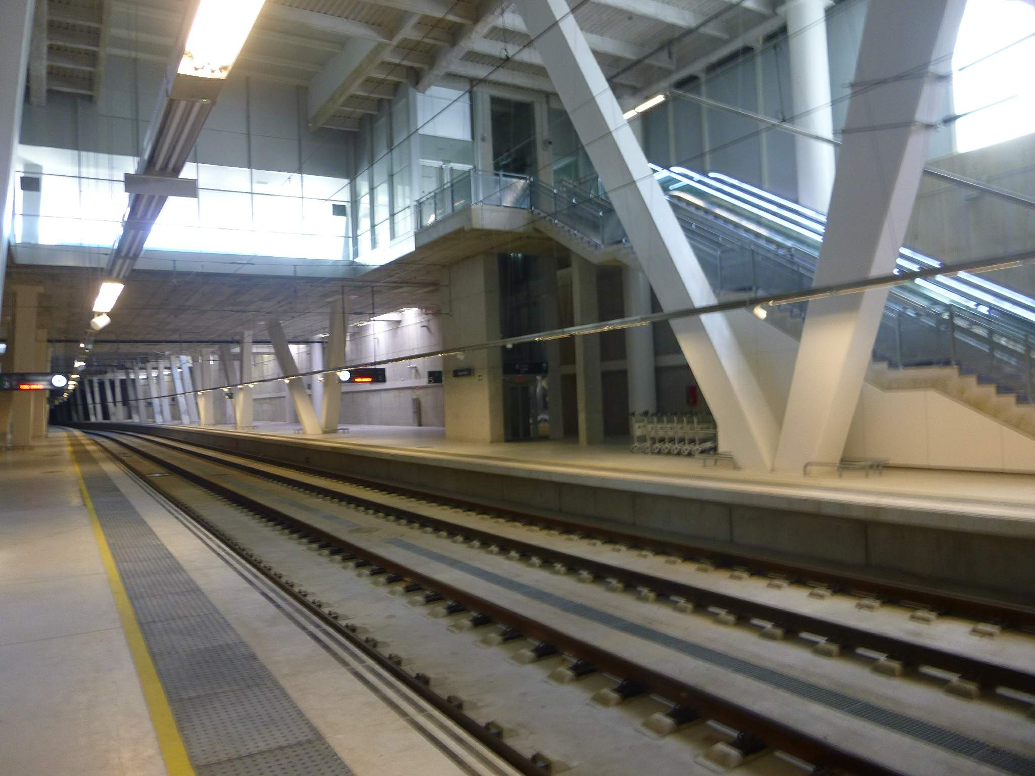 Vigo - Estación de ADIF de Vigo-Urzáiz